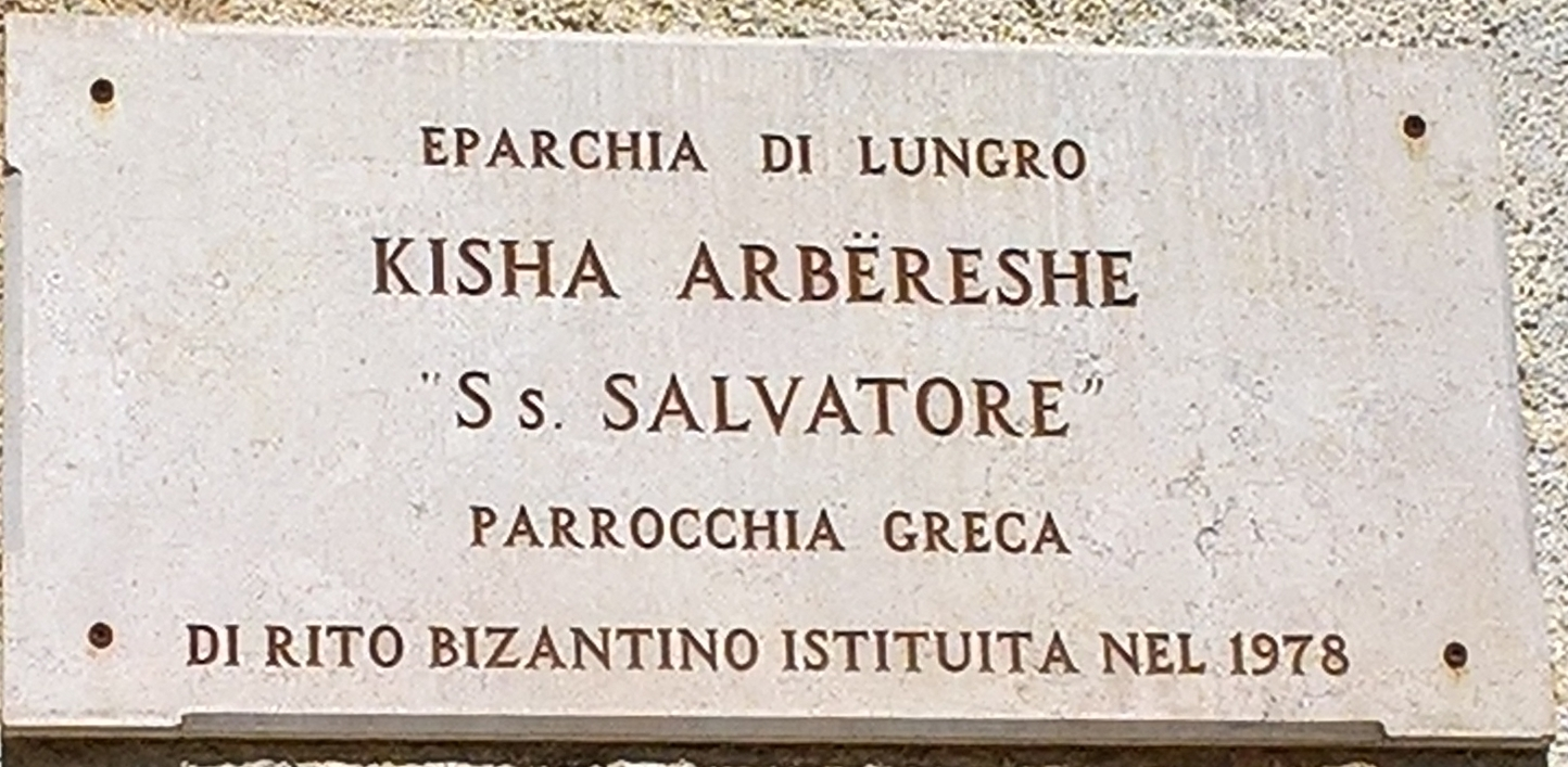 Chiesa del Santissimo Salvatore aus dem 16. Jahrhundert